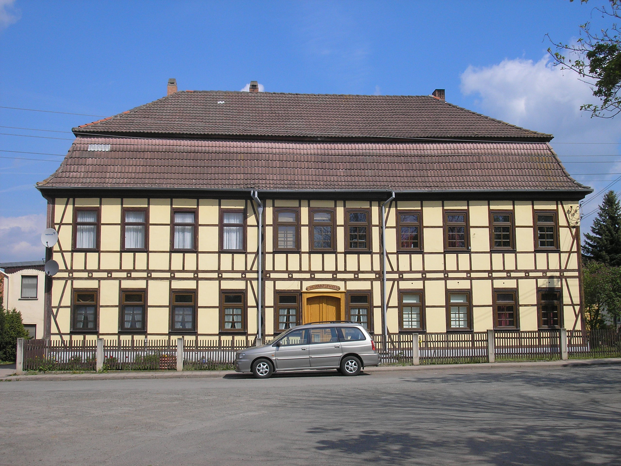 Die Heimatstube in Werningshausen (Thüringen).